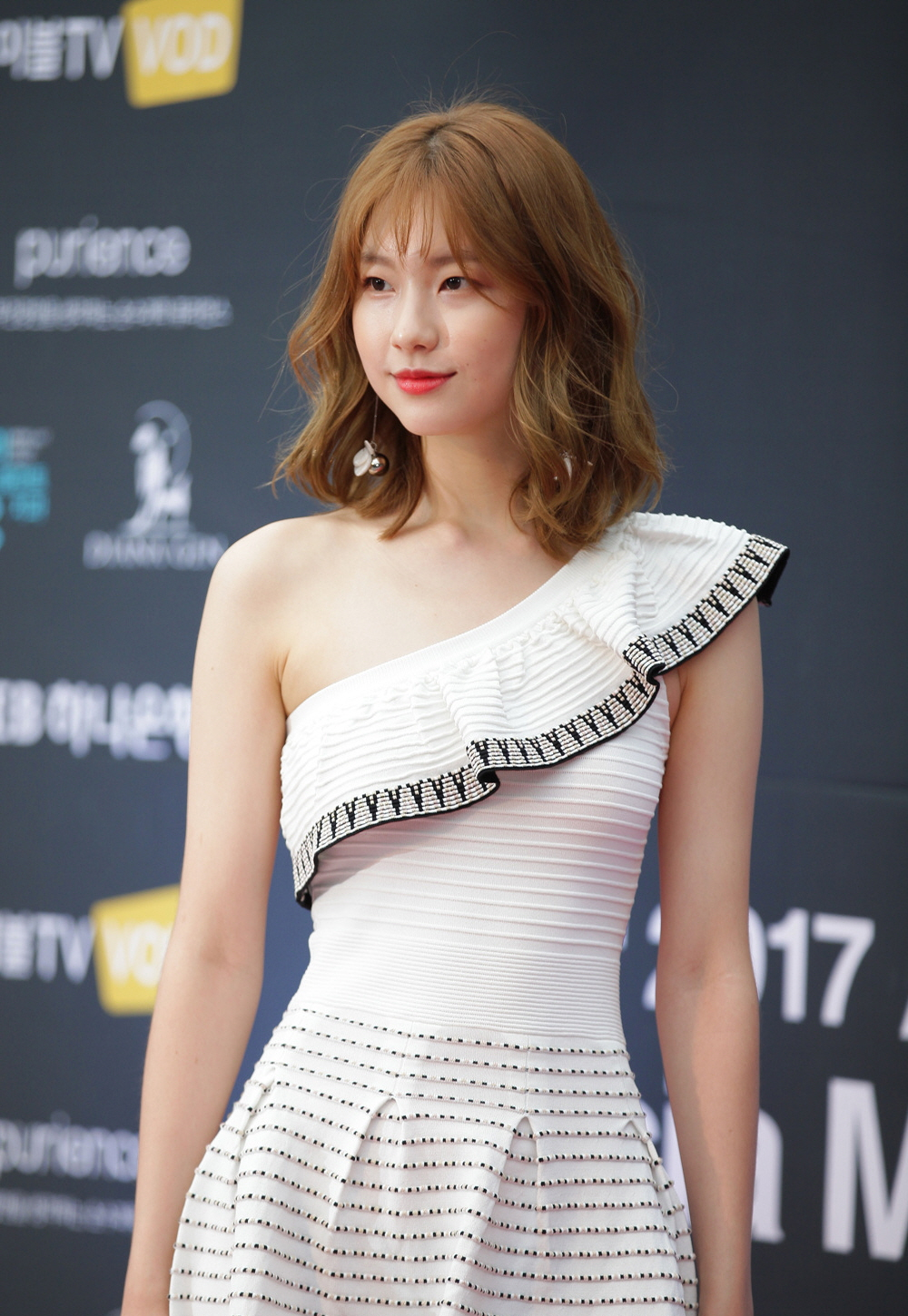 2017 아시아 모델 페스티벌 레드카펫